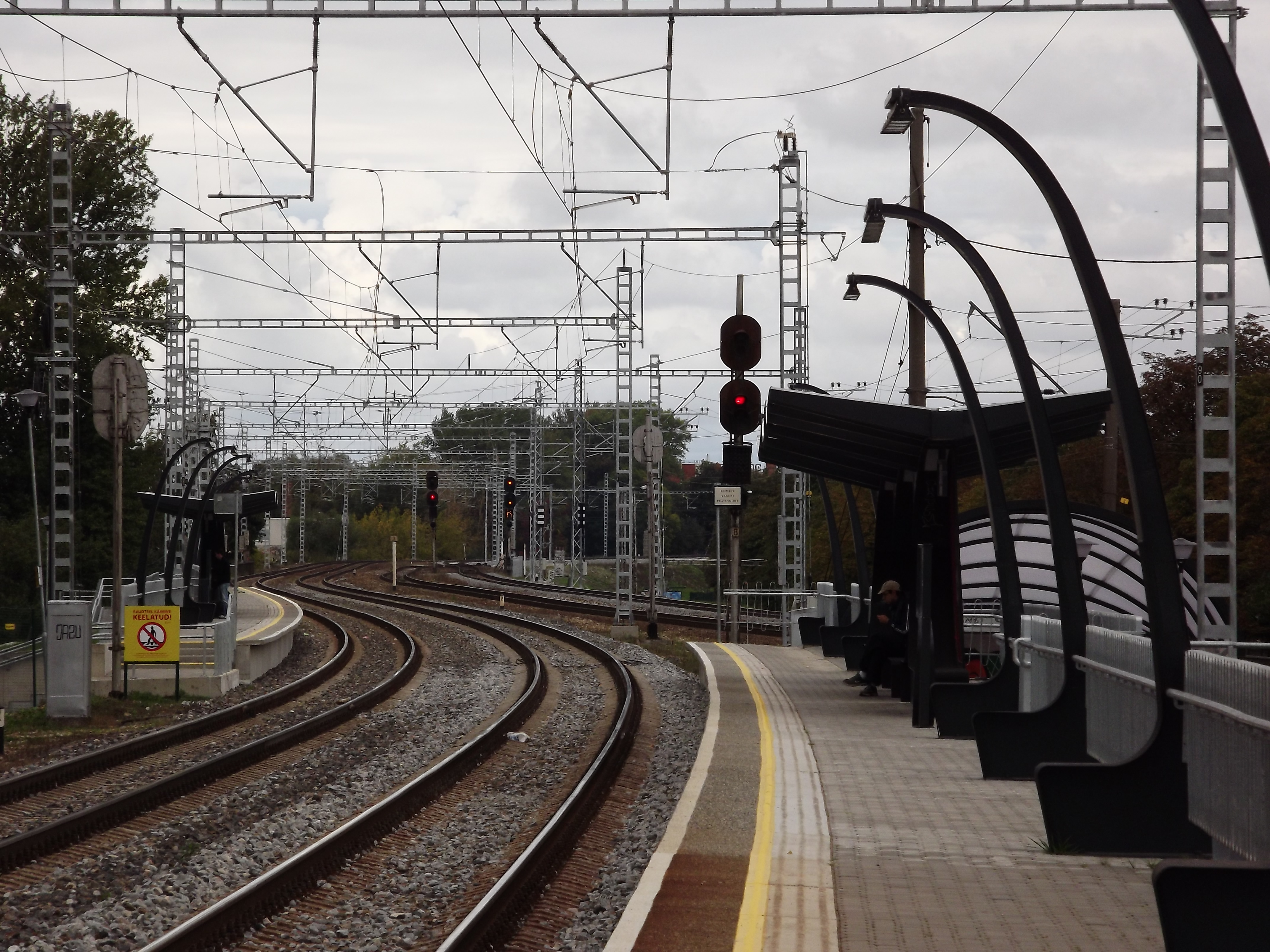 Lilleküla raudteepeatus